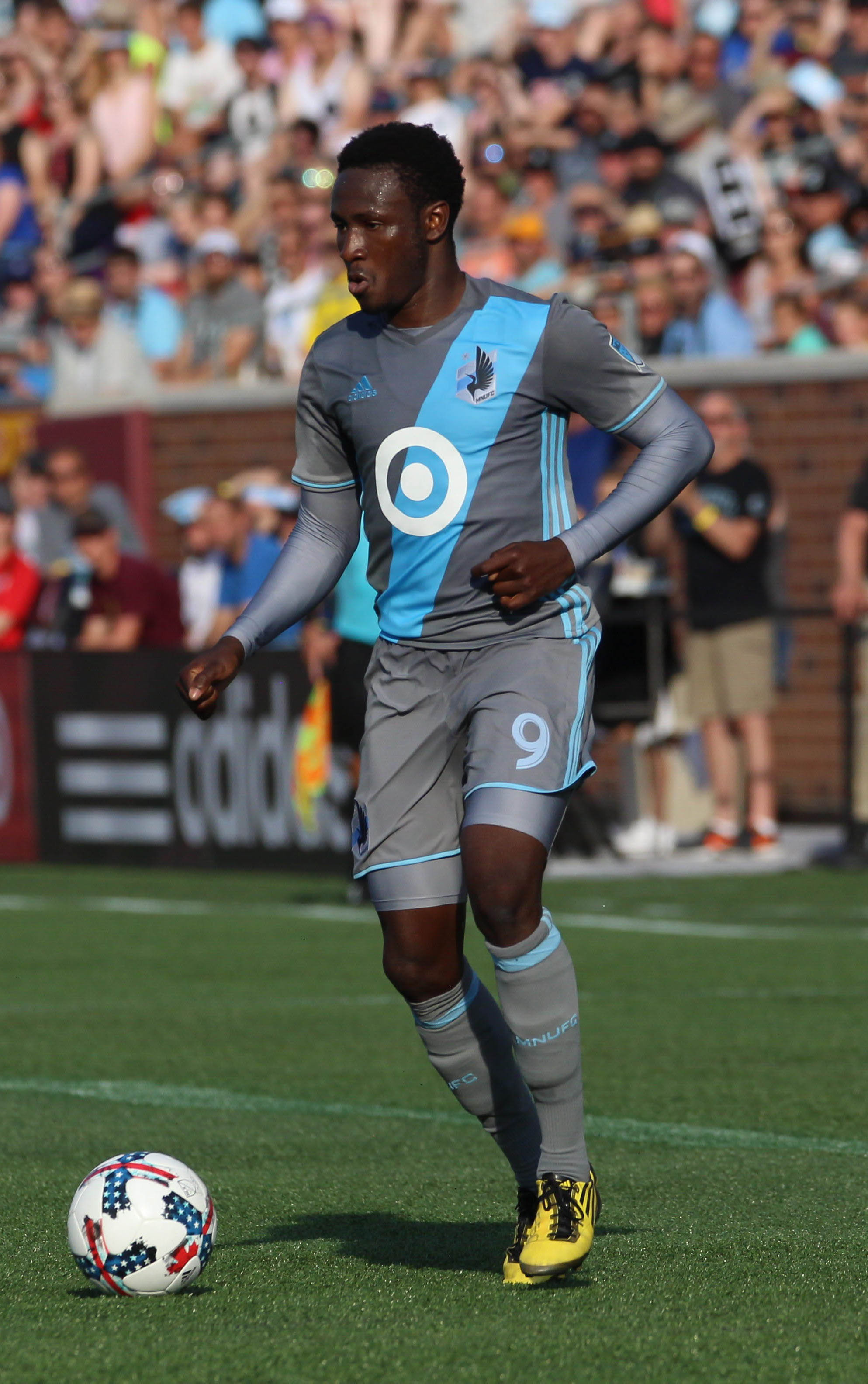 Abu Danladi - MLS - MN UNITED - Ghana - Soccer